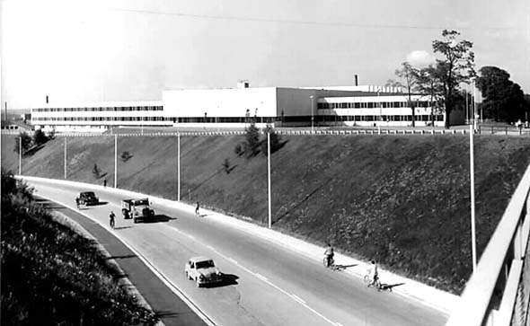 Tampereen yliopiston (silloisen Yhteiskunnallisen korkeakoulun) päärakennus vuonna 1960